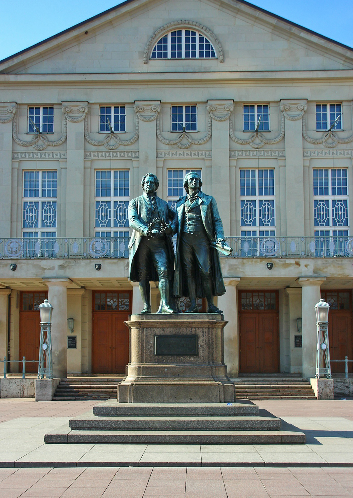 Bronzenes Doppelstandbild von Goethe und Schiller